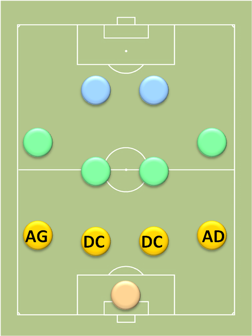 Positions_au_football_des_défenseurs_dans_un_4-4-2